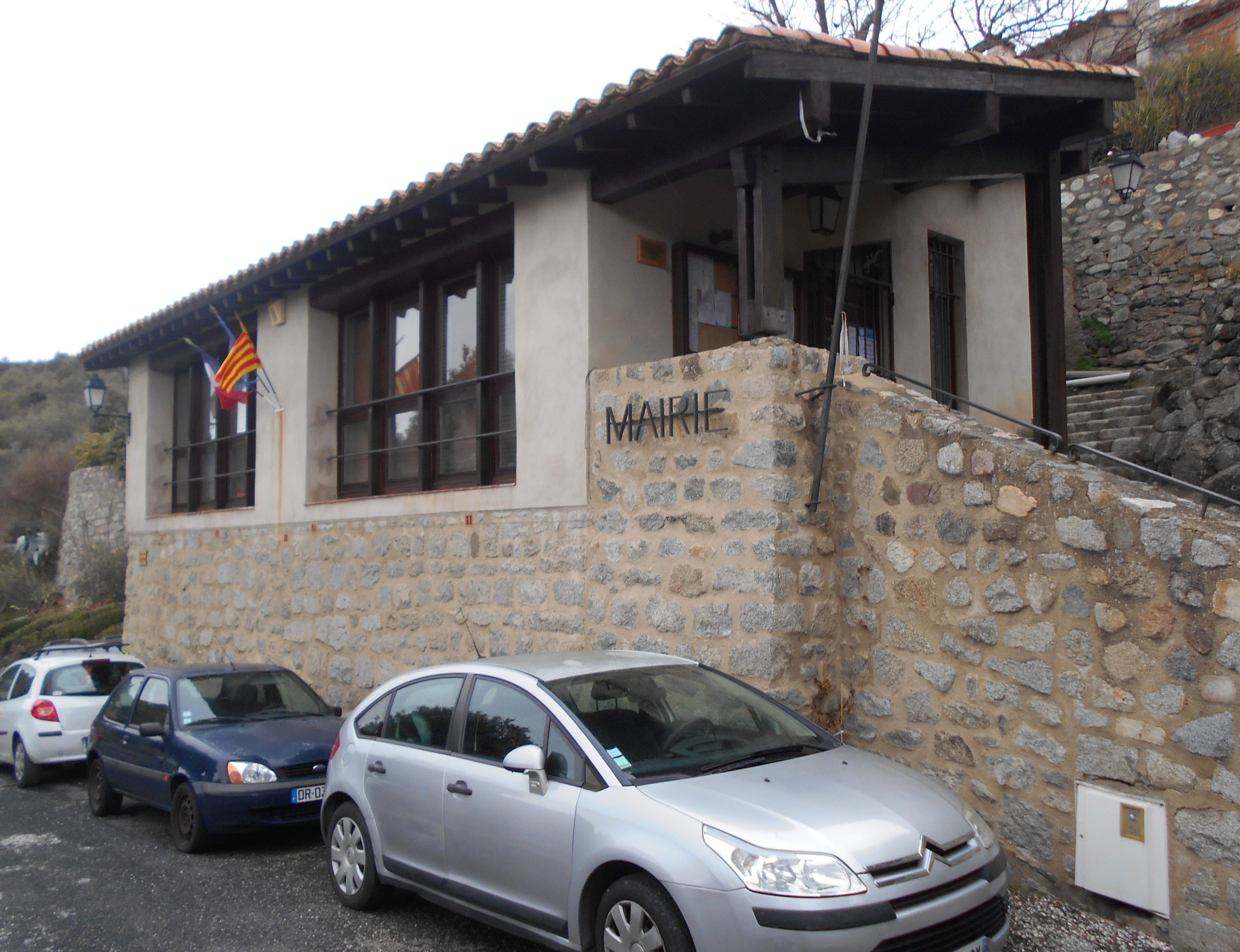 La Casa del Comú del poble d'Eus